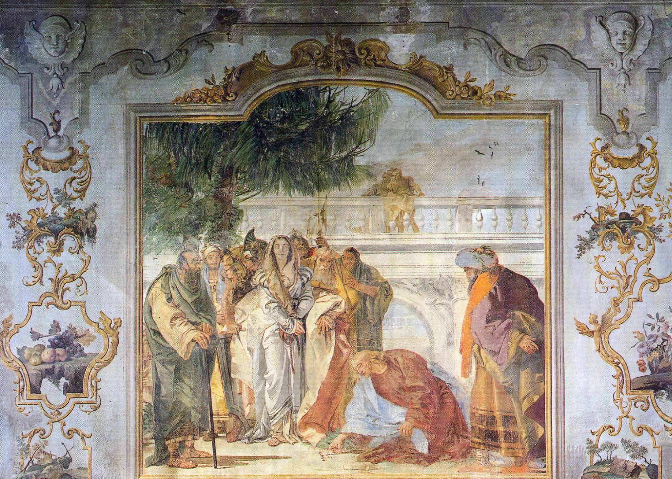 Studiolo dell'abate part2